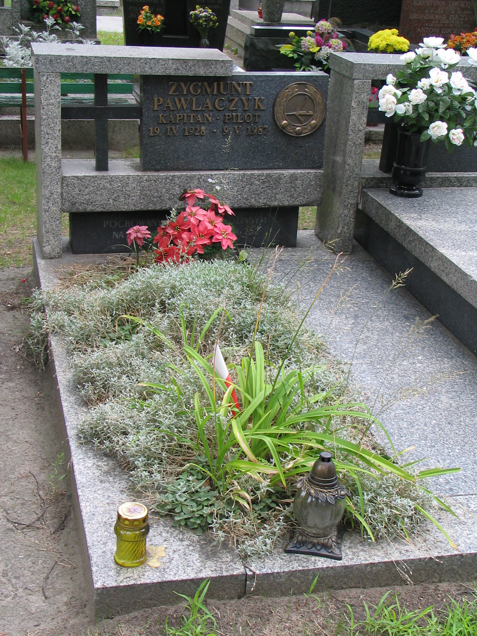 Symboliczny grób kpt. pilota Zygmunta Pawlaczyka